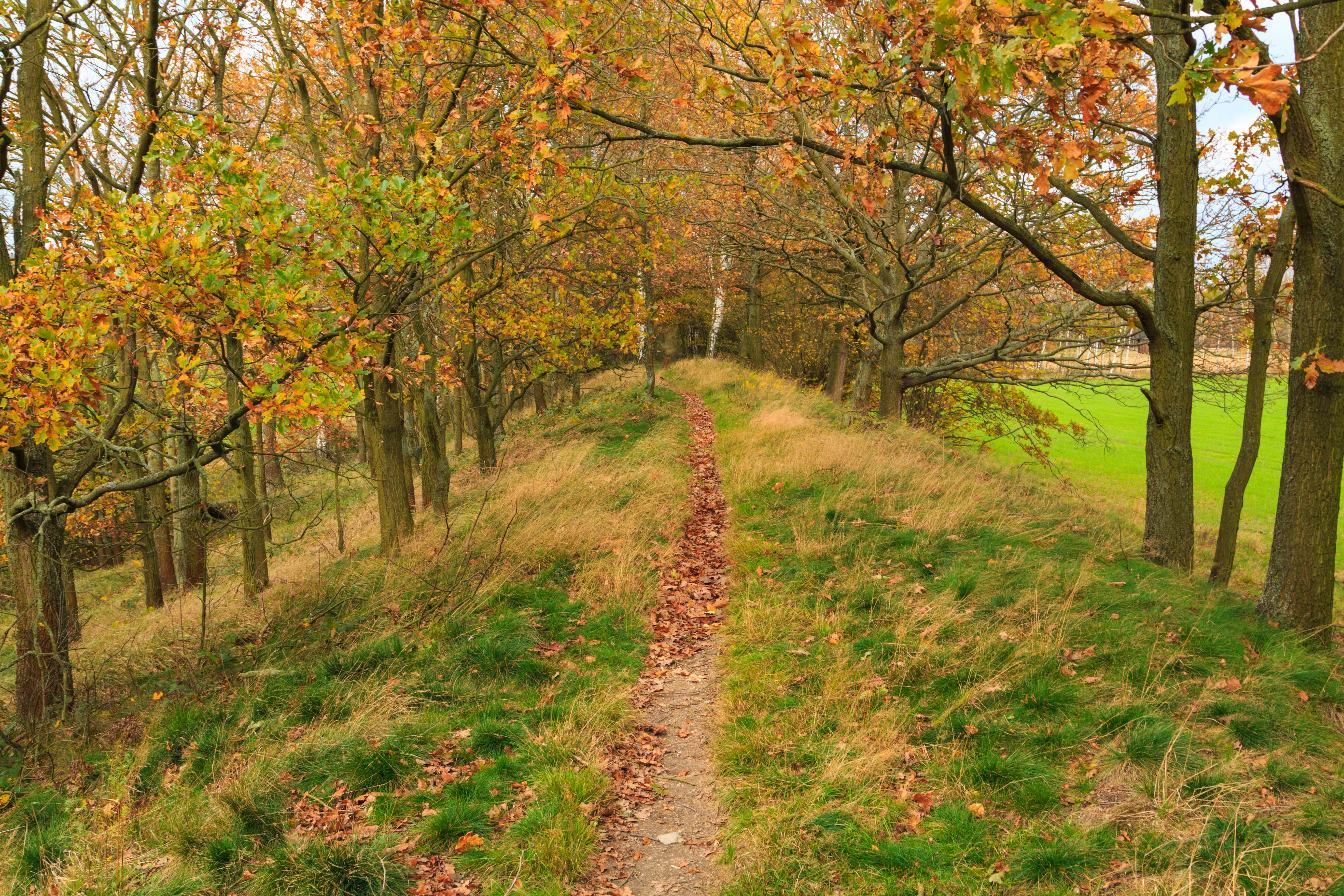 Hráz bývalého rybníka Rozkoš Project: Vodstvo.